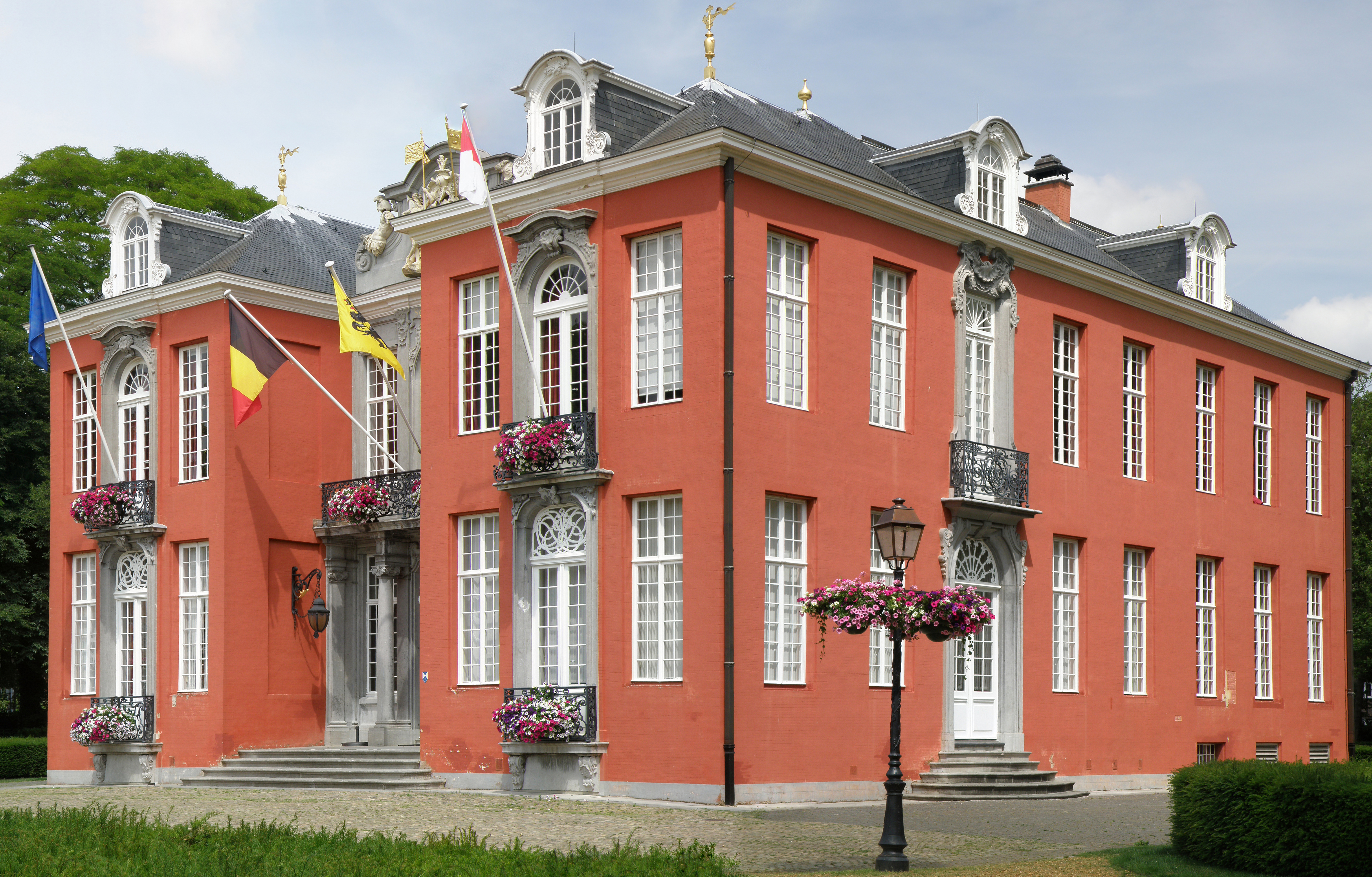 Antwerpen, district Hoboken. Kasteel Sorghvliedt.